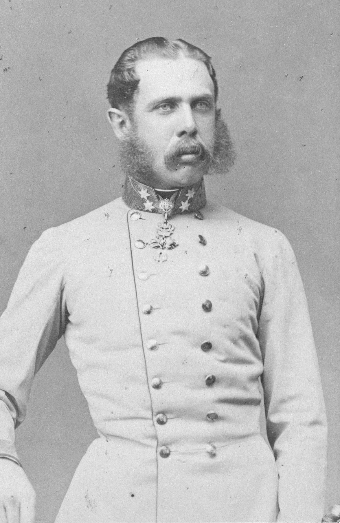 Karl Ludwig von Österreich.